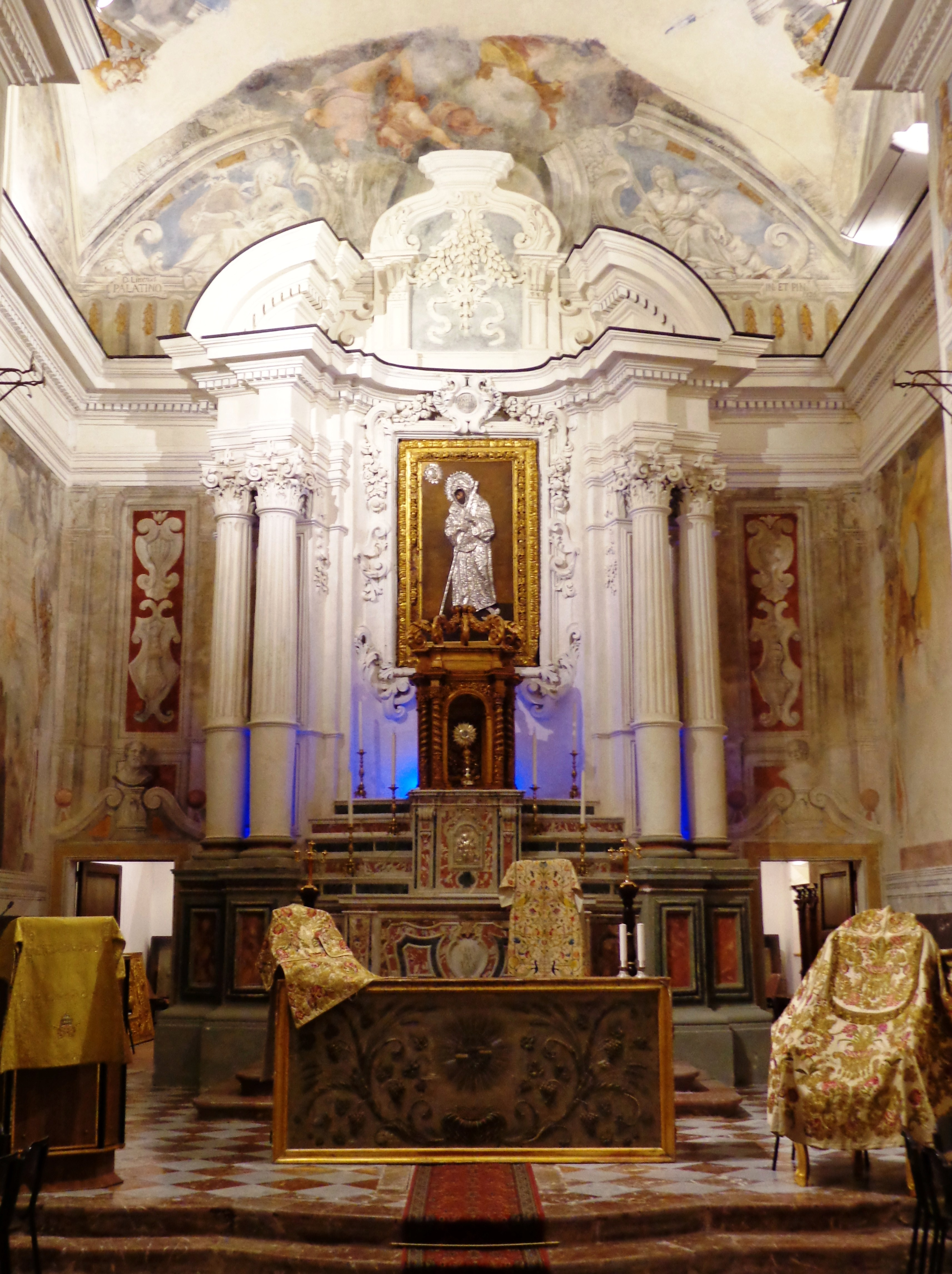 Altare Chiesa di San Francesco di Paola SPN